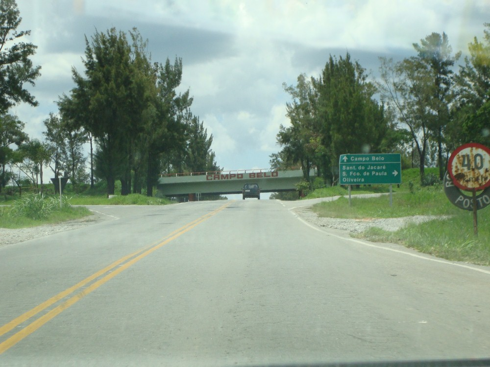 Rodovia bque_dá bentrada a Campo Belo